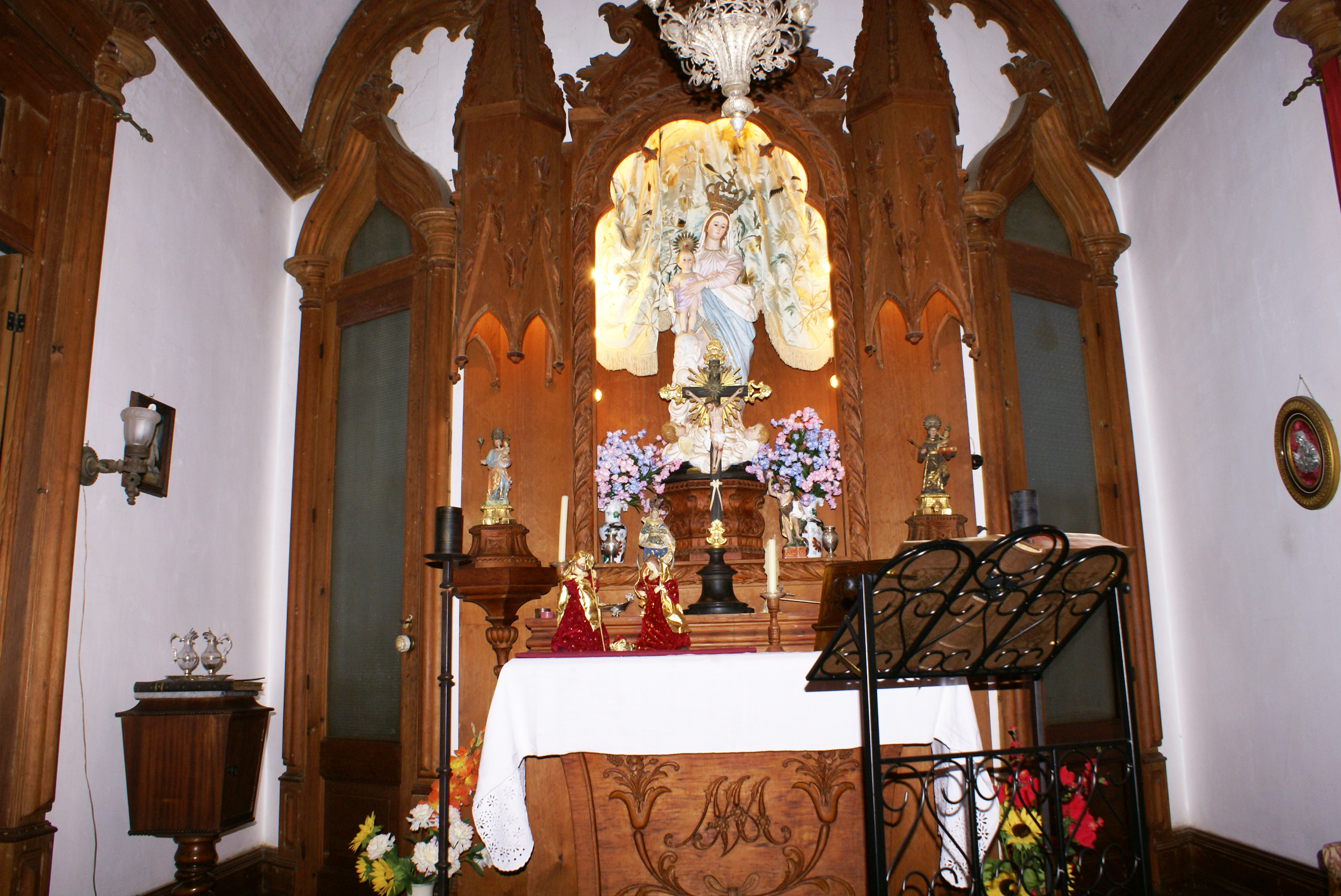 Villa Maria, Capela de Nossa Senhora das Vitórias, Angra do Heroísmo, ilha Terceira, Açores, Portugal.